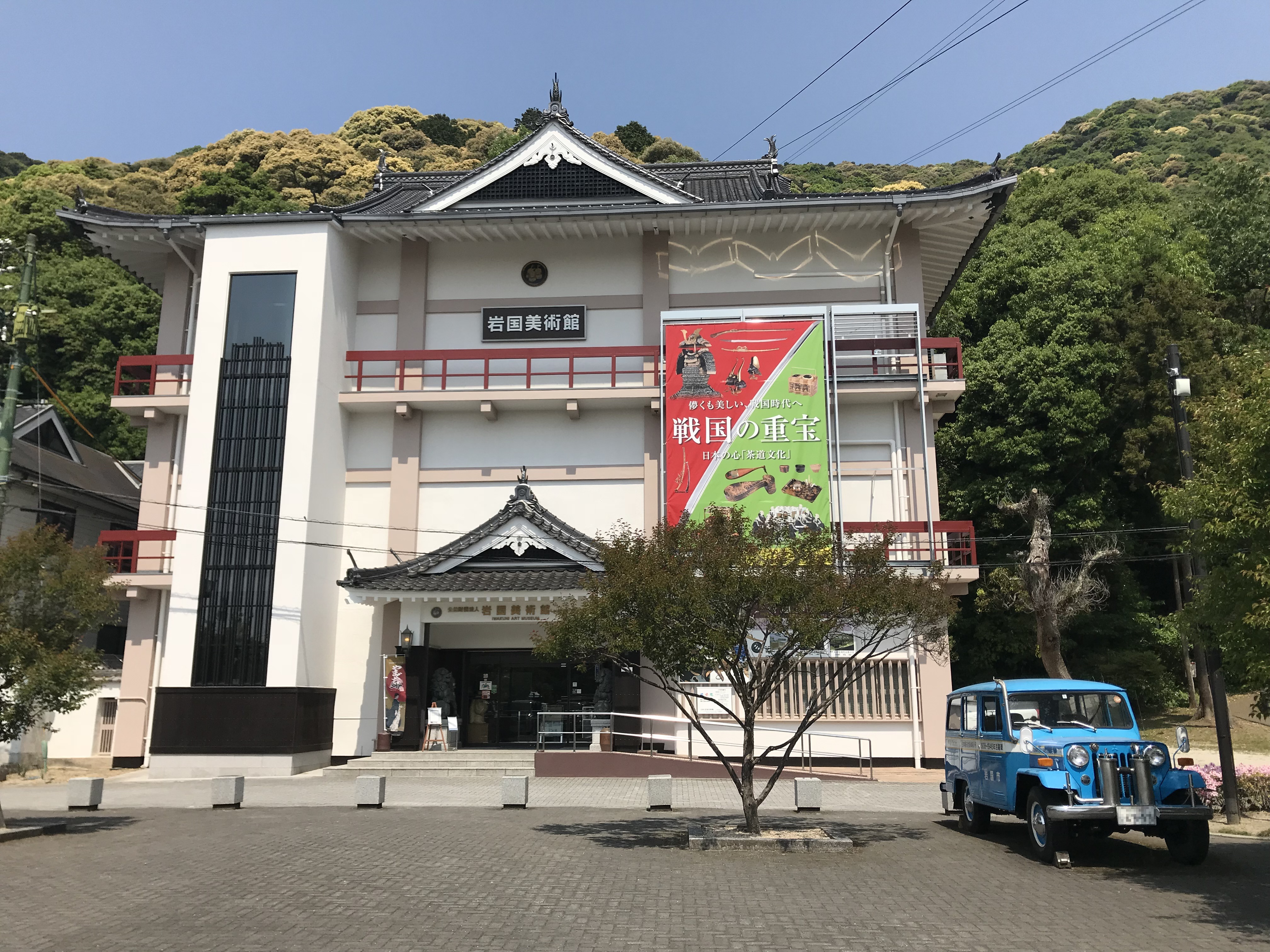 岩国美術館